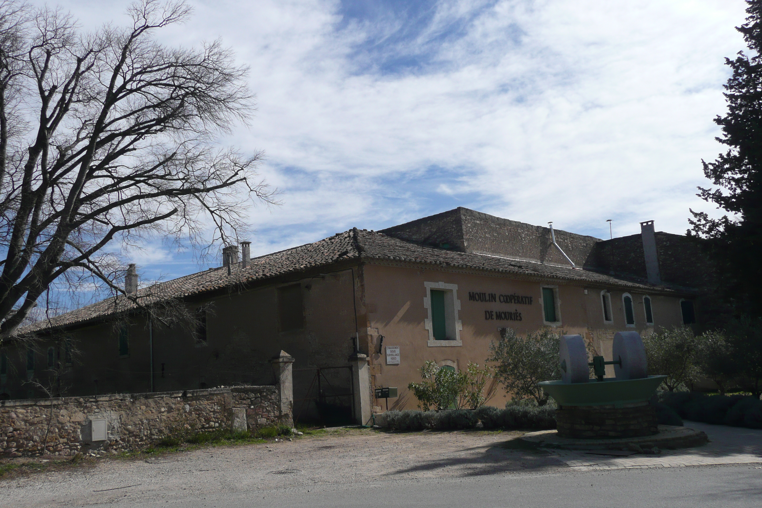 43°41′12.8″N 4°52′39.9″E / 43.686889°N 4.87775°E